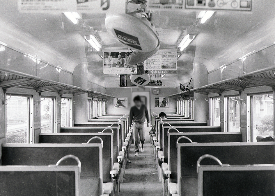 国鉄キハ55 226車内